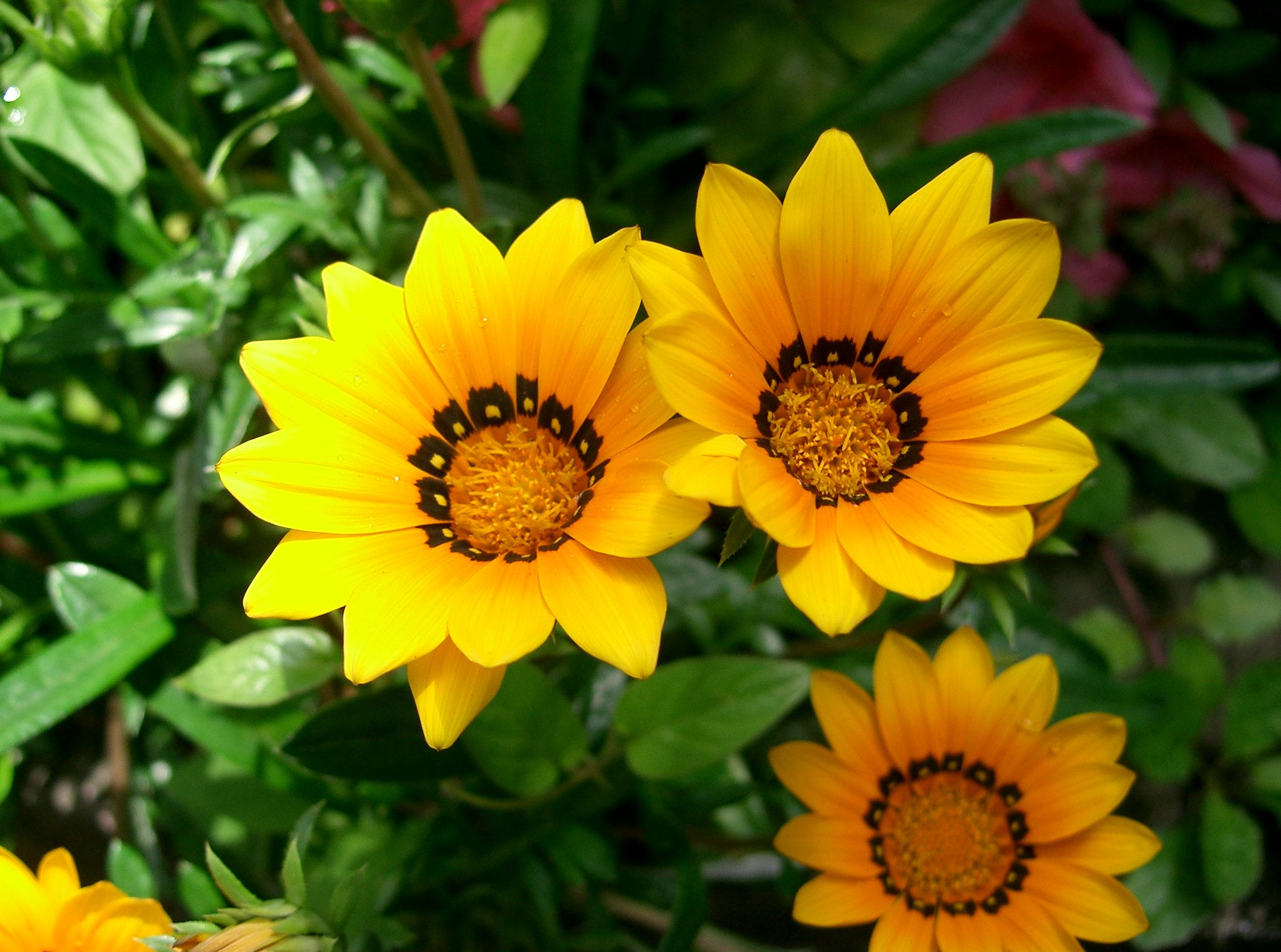 Gazania sp.